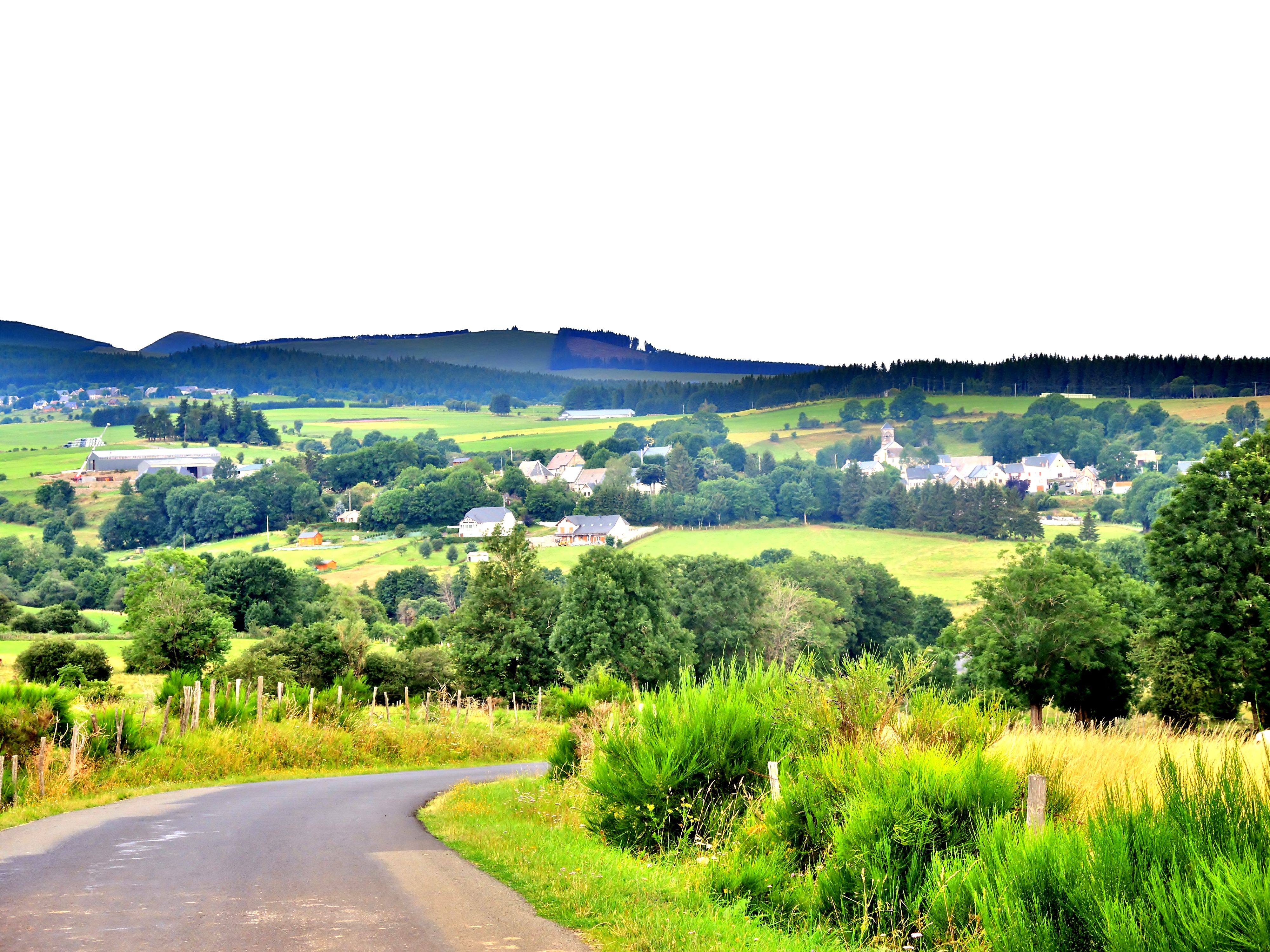 Village de Saulzet-le-Froid, vu de la route de Murol. Puy-de-Dôme